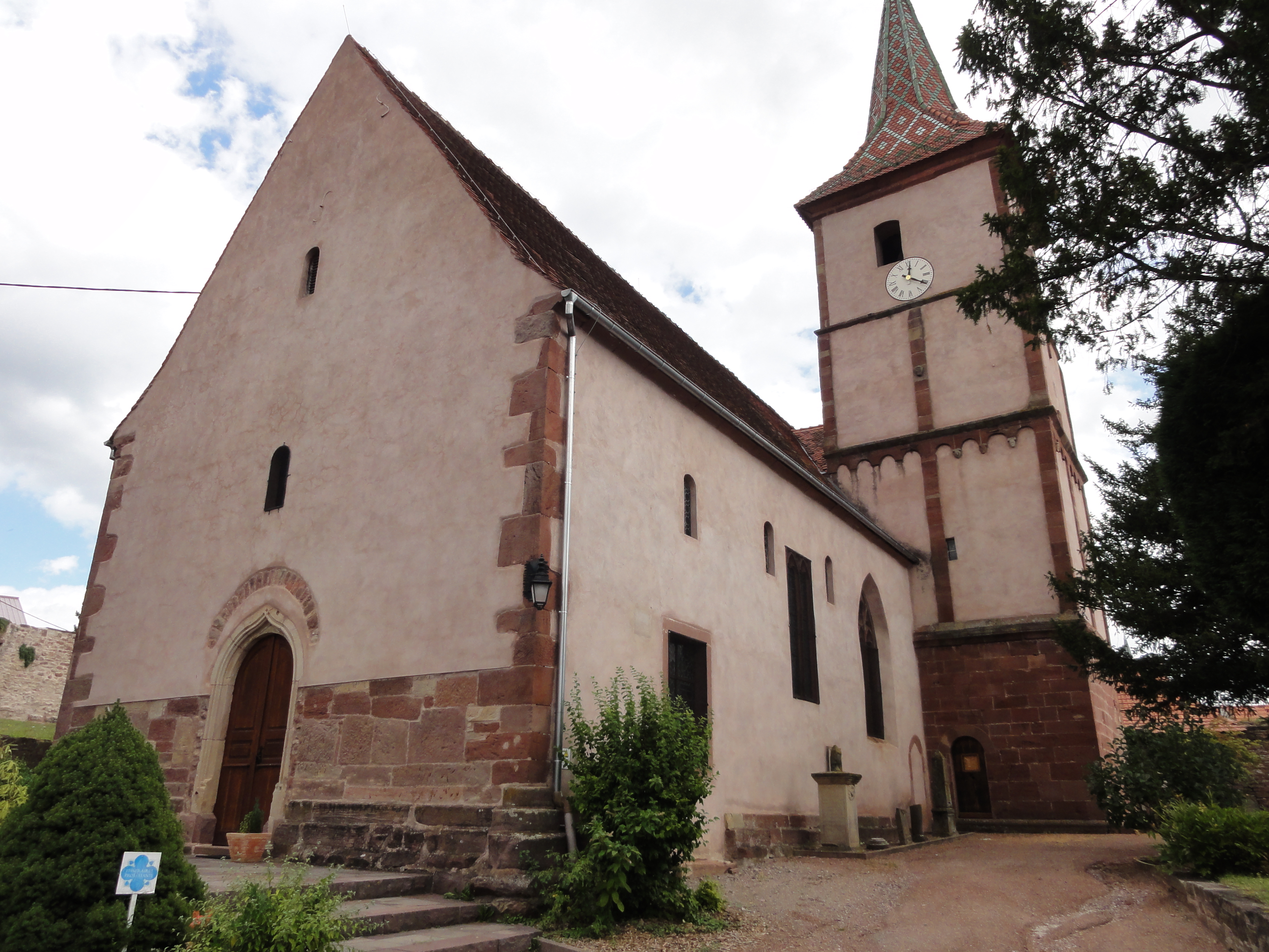 Alsace, Bas-Rhin, Balbronn, Église protestante (PA00085276, IA67006522).